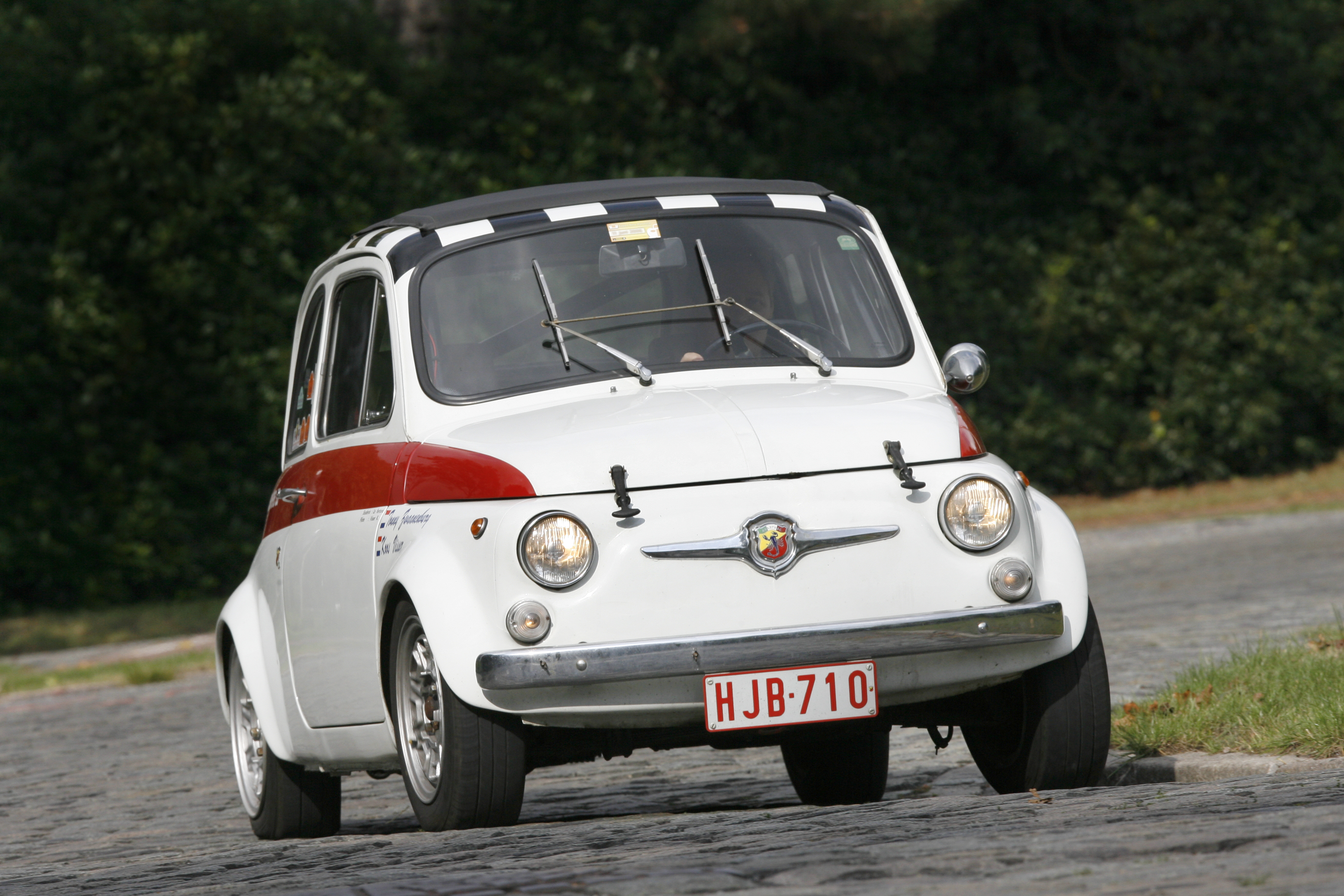 Abarth 695SS